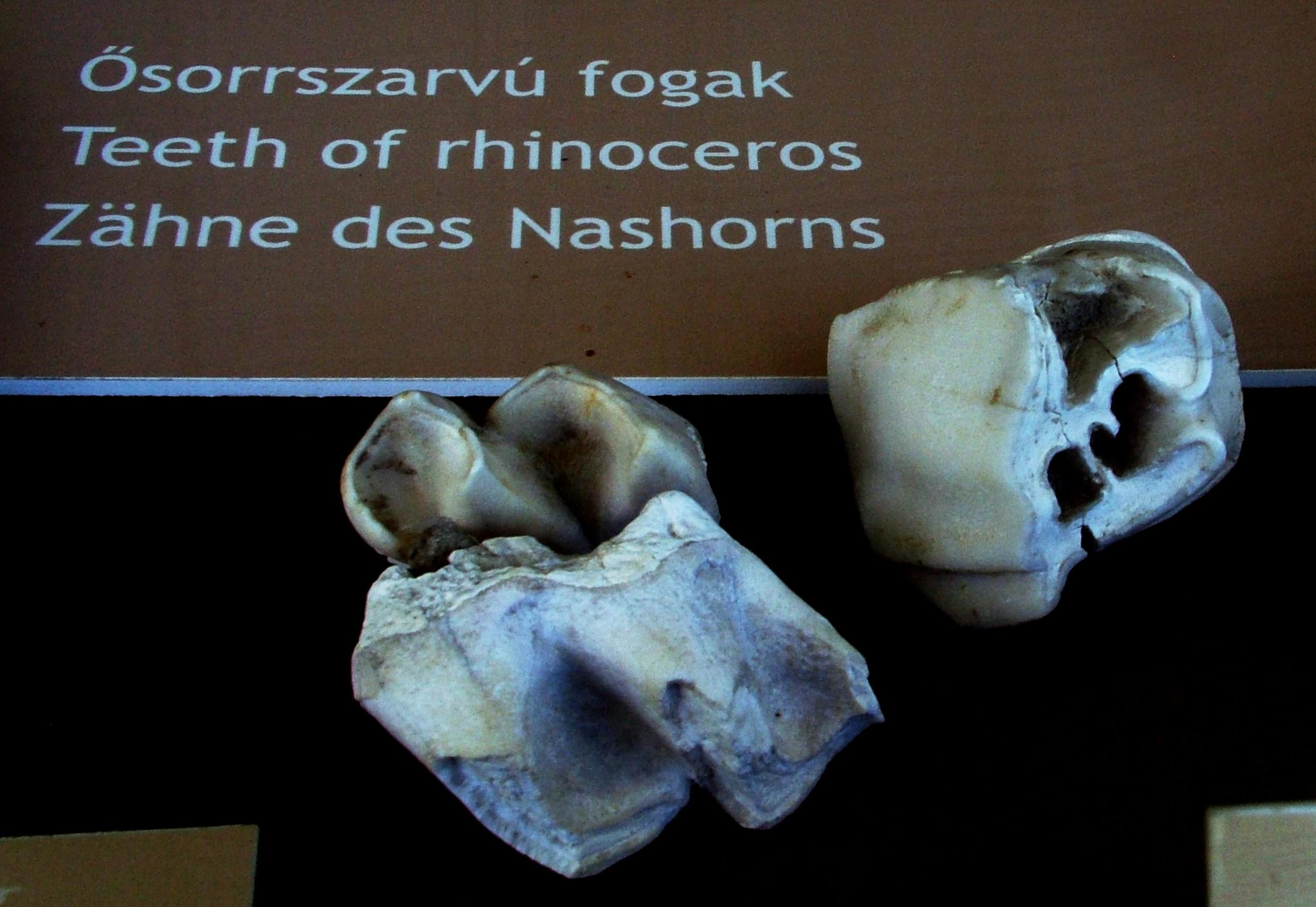 Őskőkori orrszarvú fogak (Vértesszőlős Őstelep)